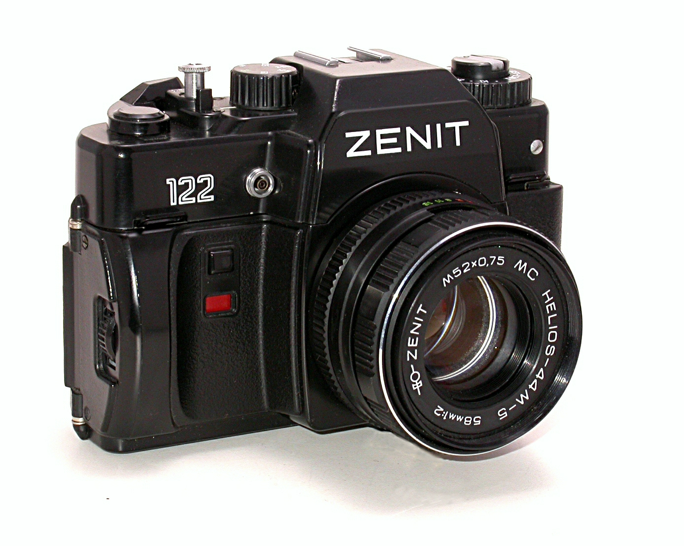 Zenit 122